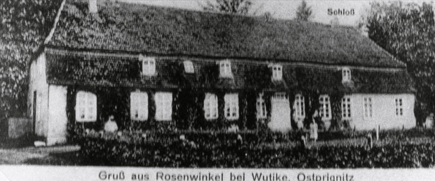 Ansichtskarte des Gutshauses („Schloss“) Rosenwinkel bei Wutike in der Prignitz (1945 zweckentfremdet und in der Folge dem Verfall preisgegeben, kurz nach 1989 auch letzte Überreste entfernt)